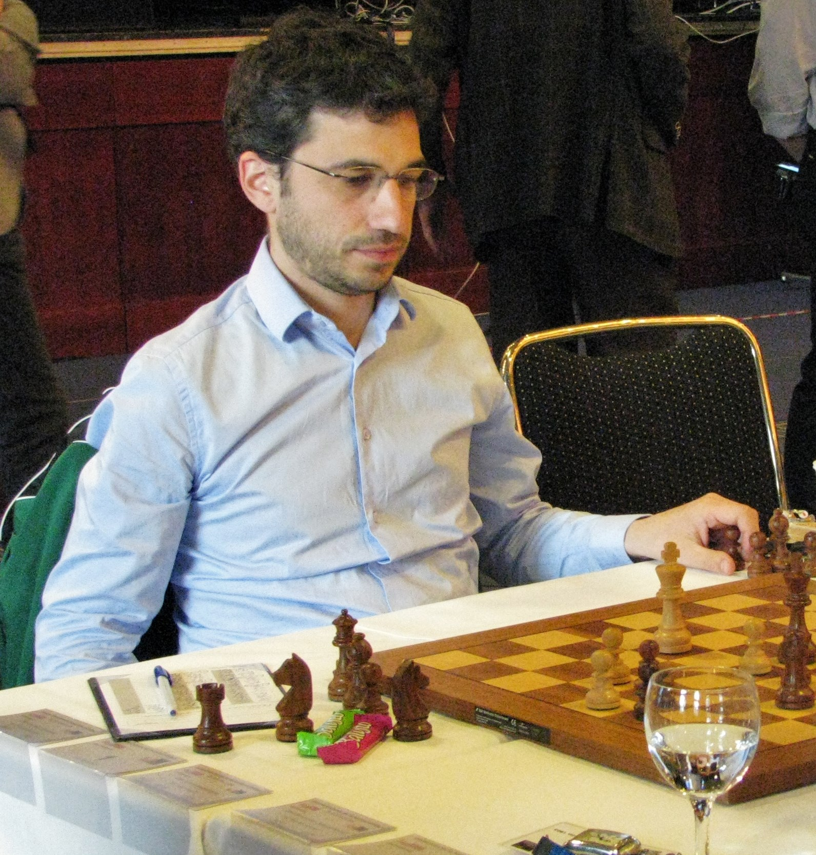 Laurent Fressinet für Werder Bremen bei der Bundesliga-Finalrunde 2017 in Berlin